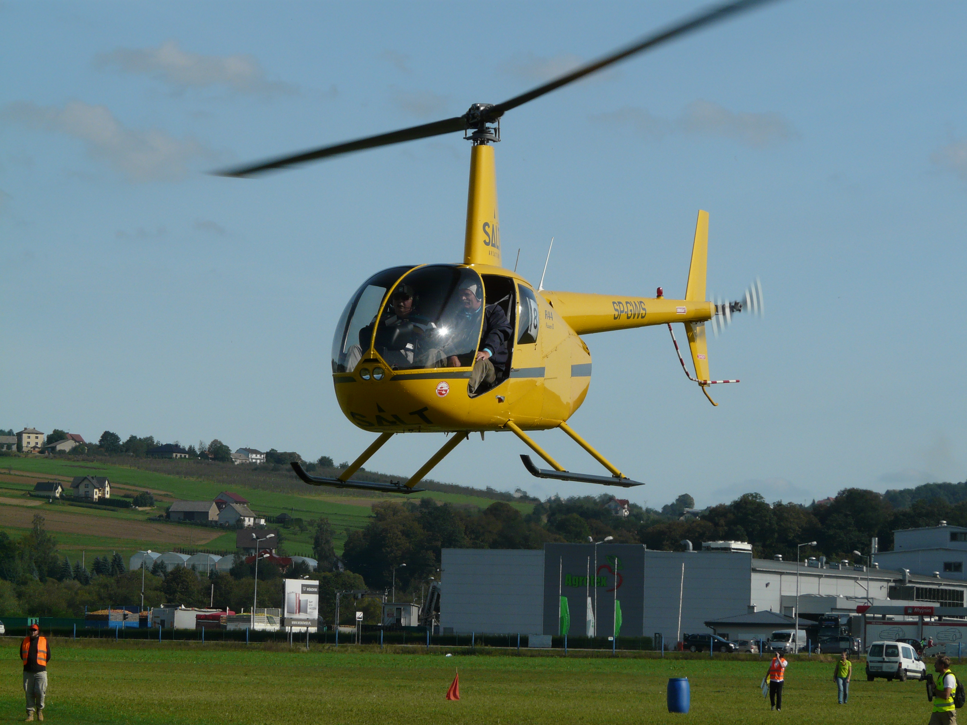 Maxim Sotnikov w czasie zawodów Helikopter Wiele Cup 2019, startował w zawodach na wyposażyczonym śmigłowcu R-44